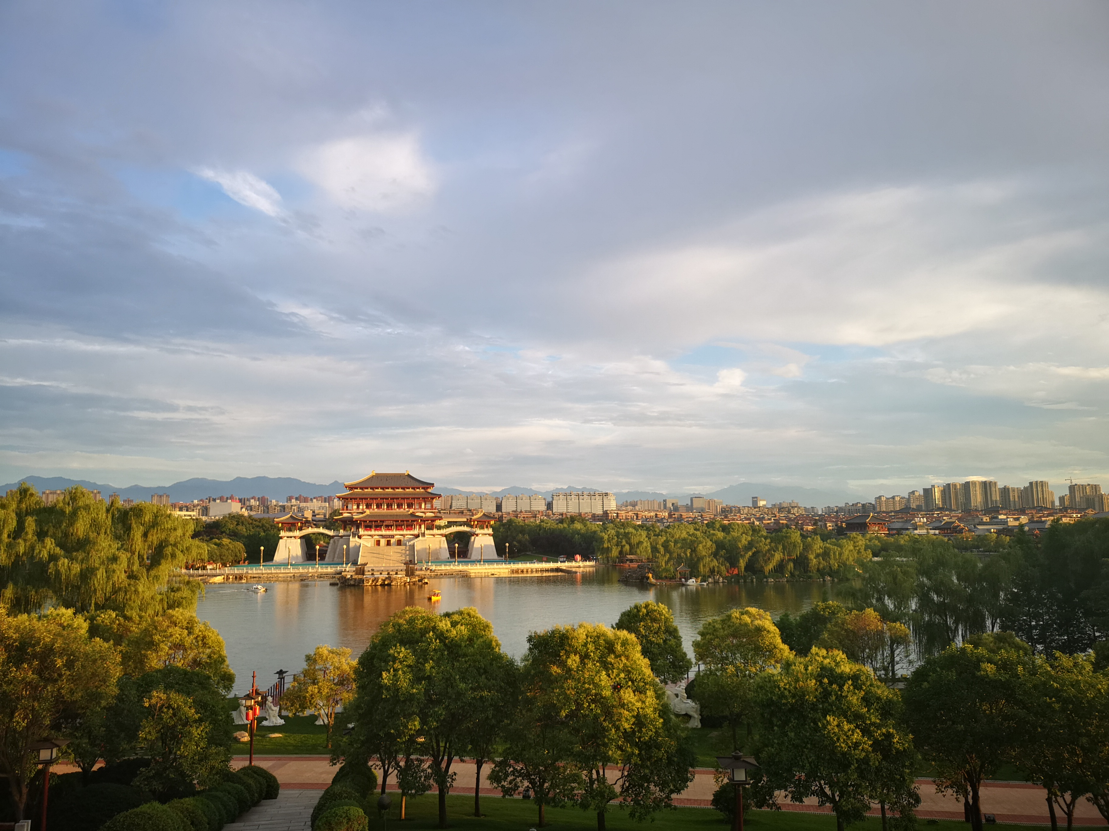 中文（中国大陆）: 大唐芙蓉园